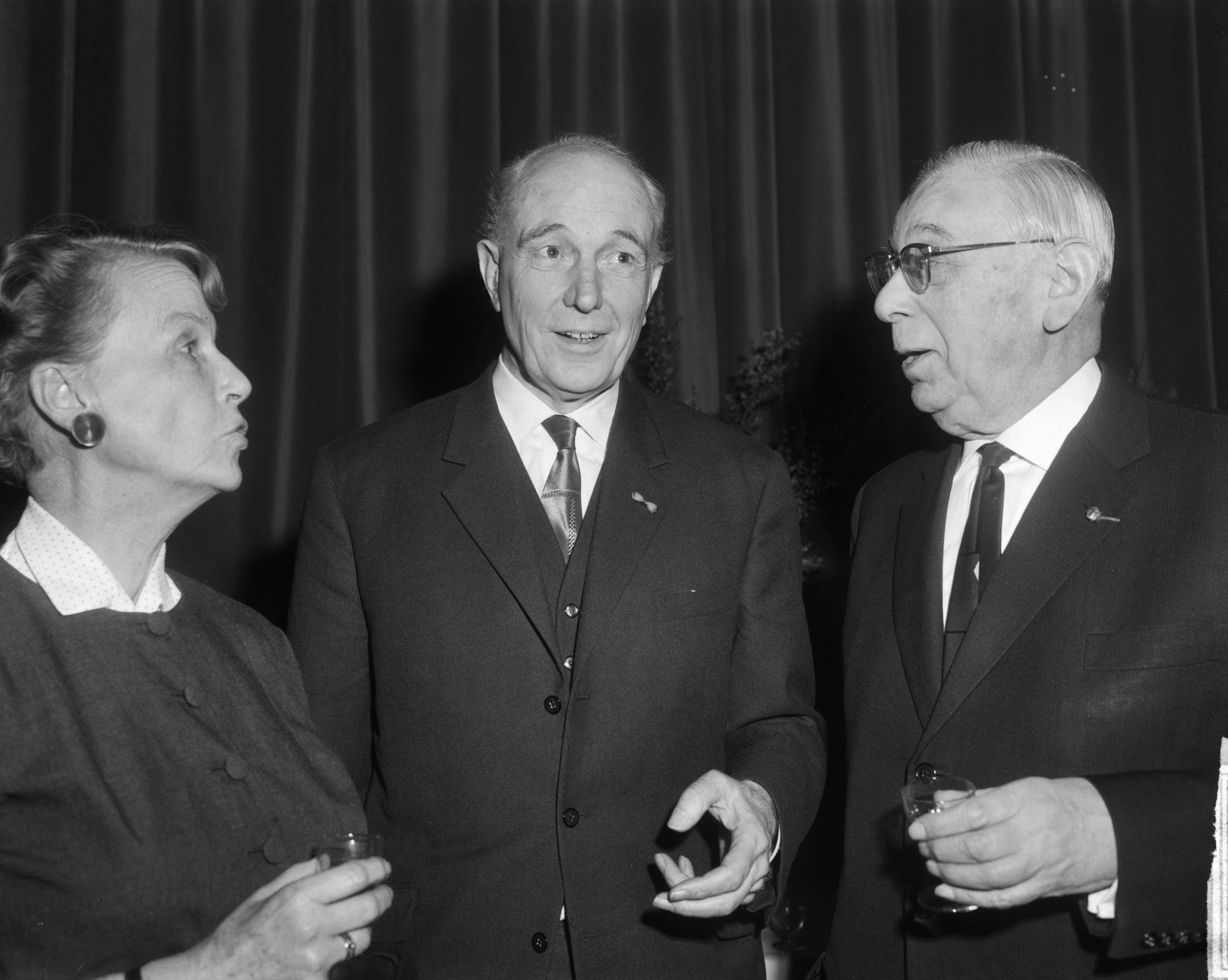 60-jarig bestaan van de Vereniging van Letterkundigen , tijdens receptie v.l.n.r. Clara Eggink , prof. dr. A. Donker en dr. Van Vriesland 12 februari 1965